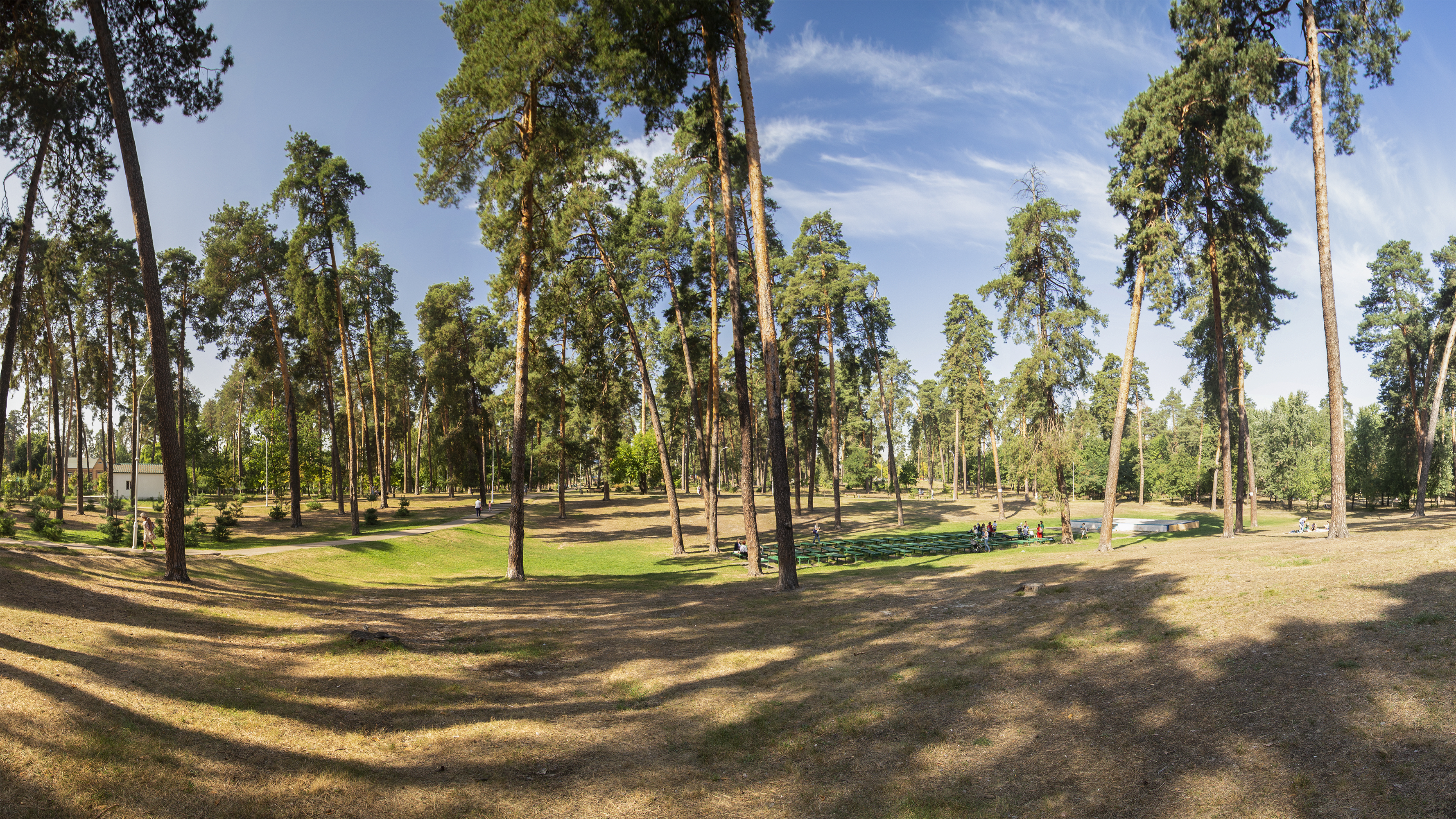 Парк «Партизанська слава», Київ, вул. Тростянецька та Славгородська